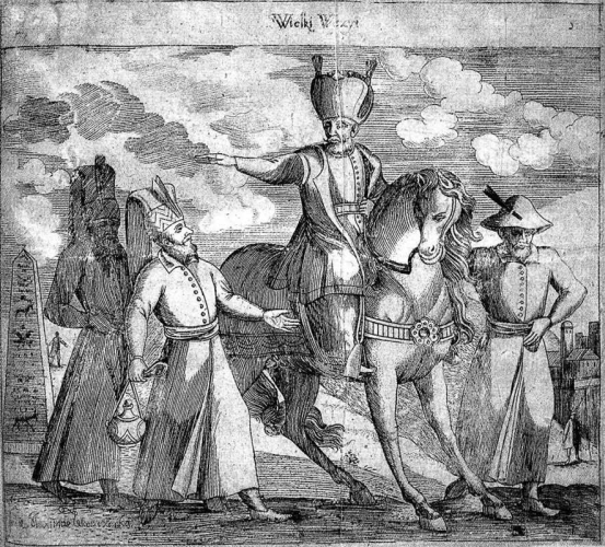 Ілюстрацыя да кнігі "Манархія турэцкая"